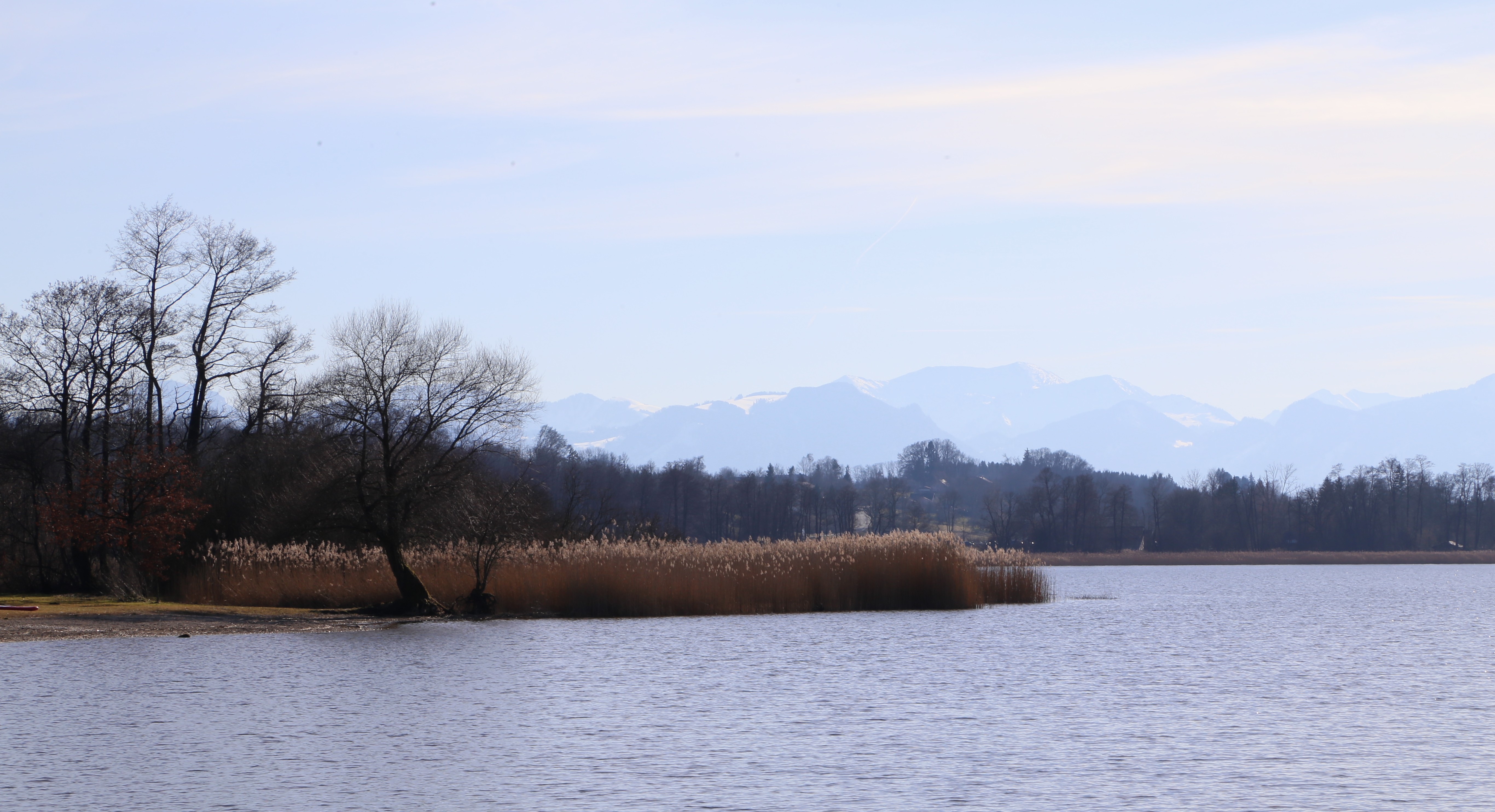 Simssee, Südufer bei Pietzing